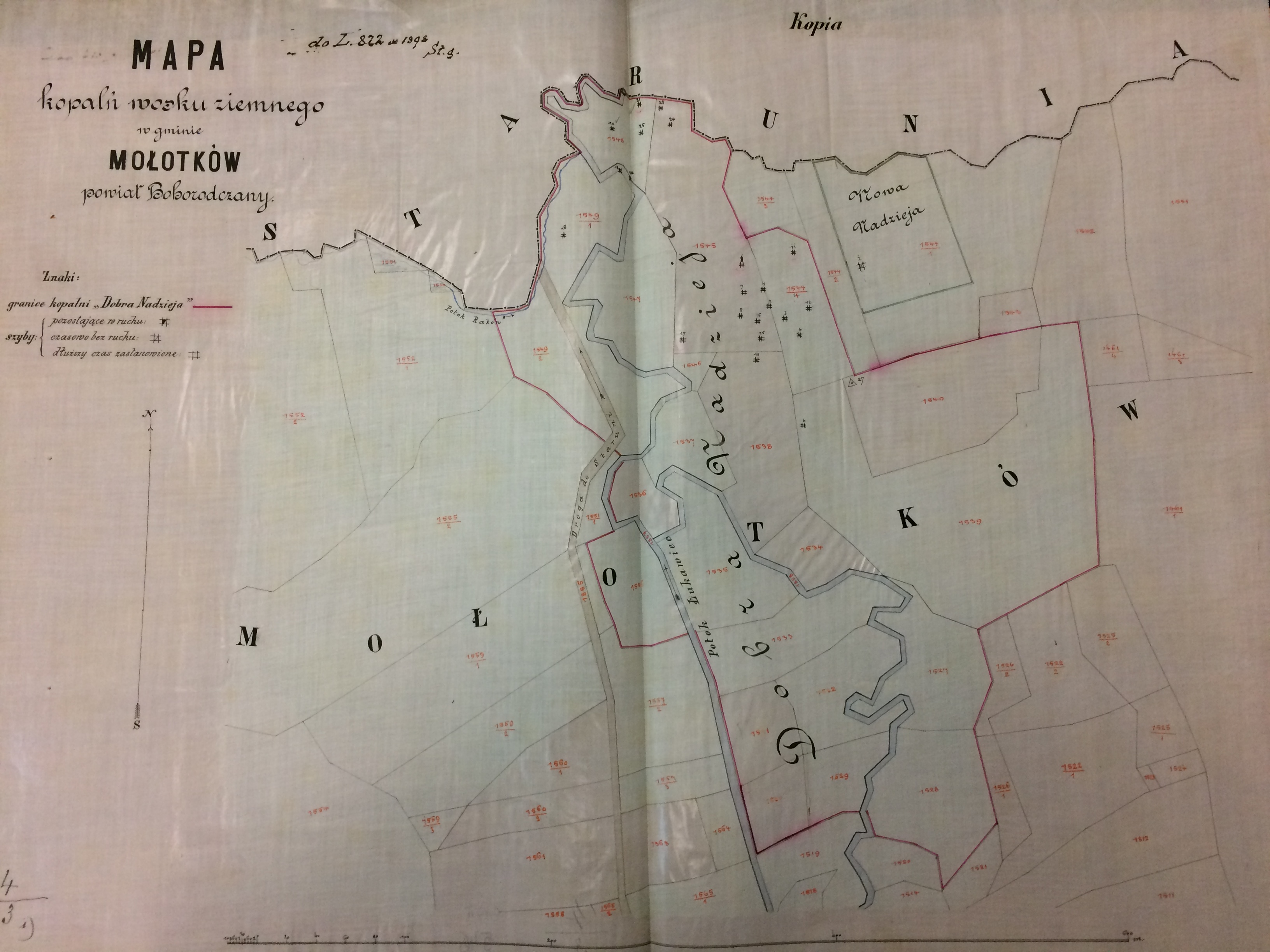 Карта копальні озокериту "Добра Надія", 1898р.